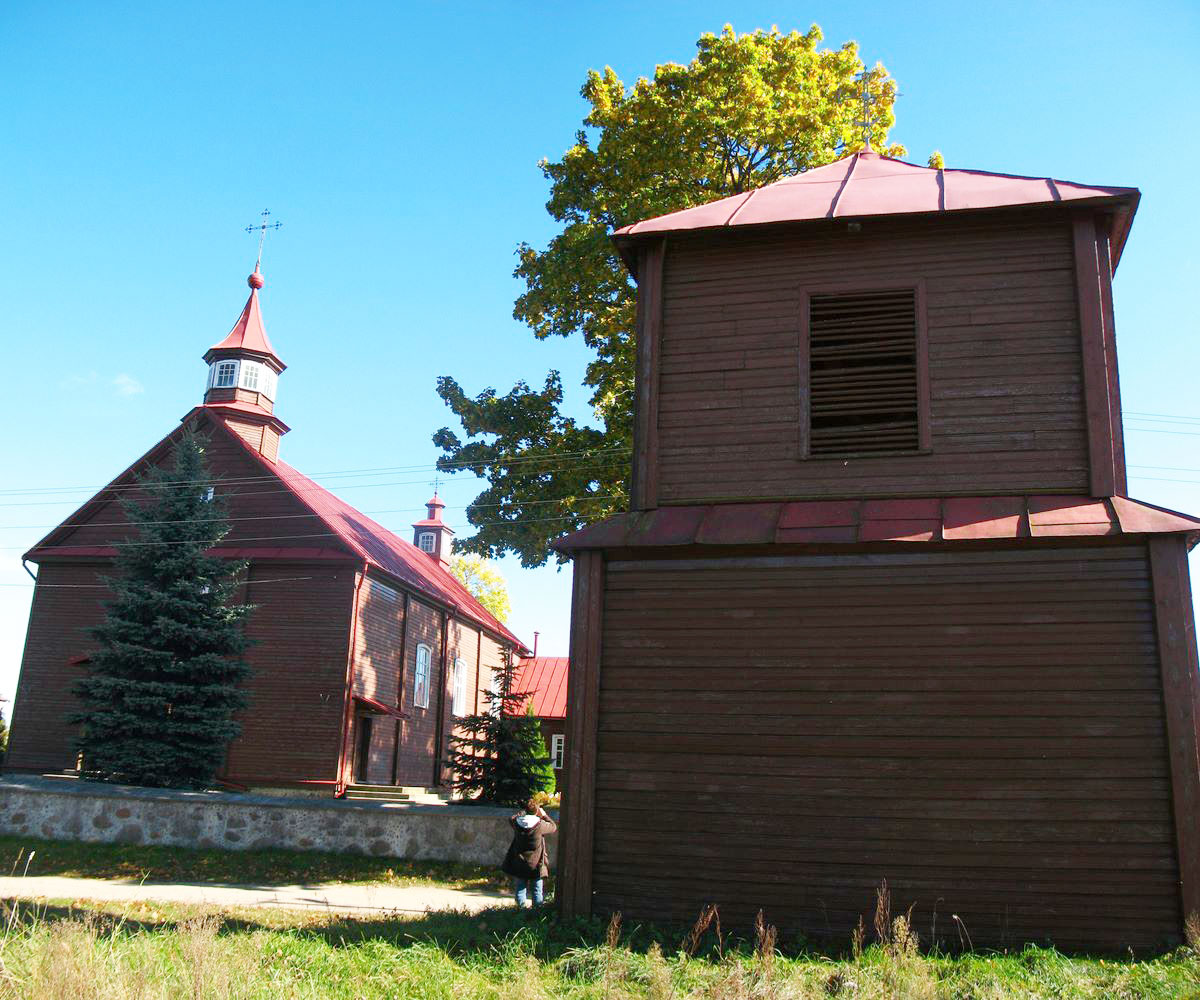 Беларуская (тарашкевіца): Новы Двор